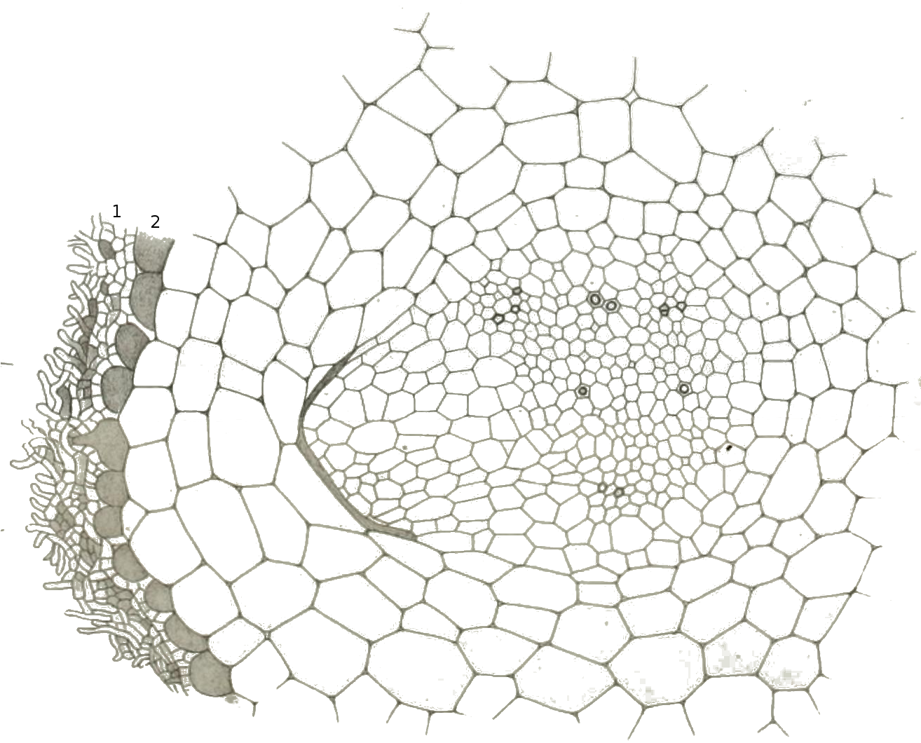 Coupe transversale de la racine de Monotropa hypopitys avec l'origine d'une radicelle : 1. le mycélium enveloppant la racine ; 2. l'épiderme de la radicelle à l'état mort caché à l'intérieur du mycellium. Dessin fait d'après nature grâce au prisme de Nachet, X300